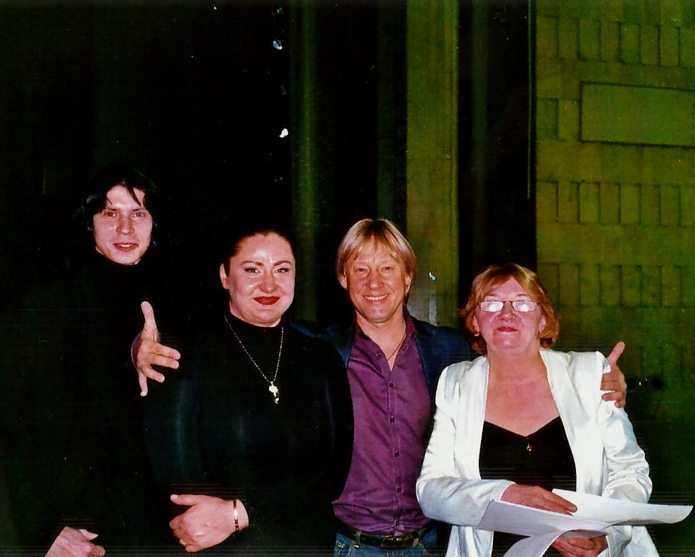 Дмитрий Харатьян и Елена Суржикова